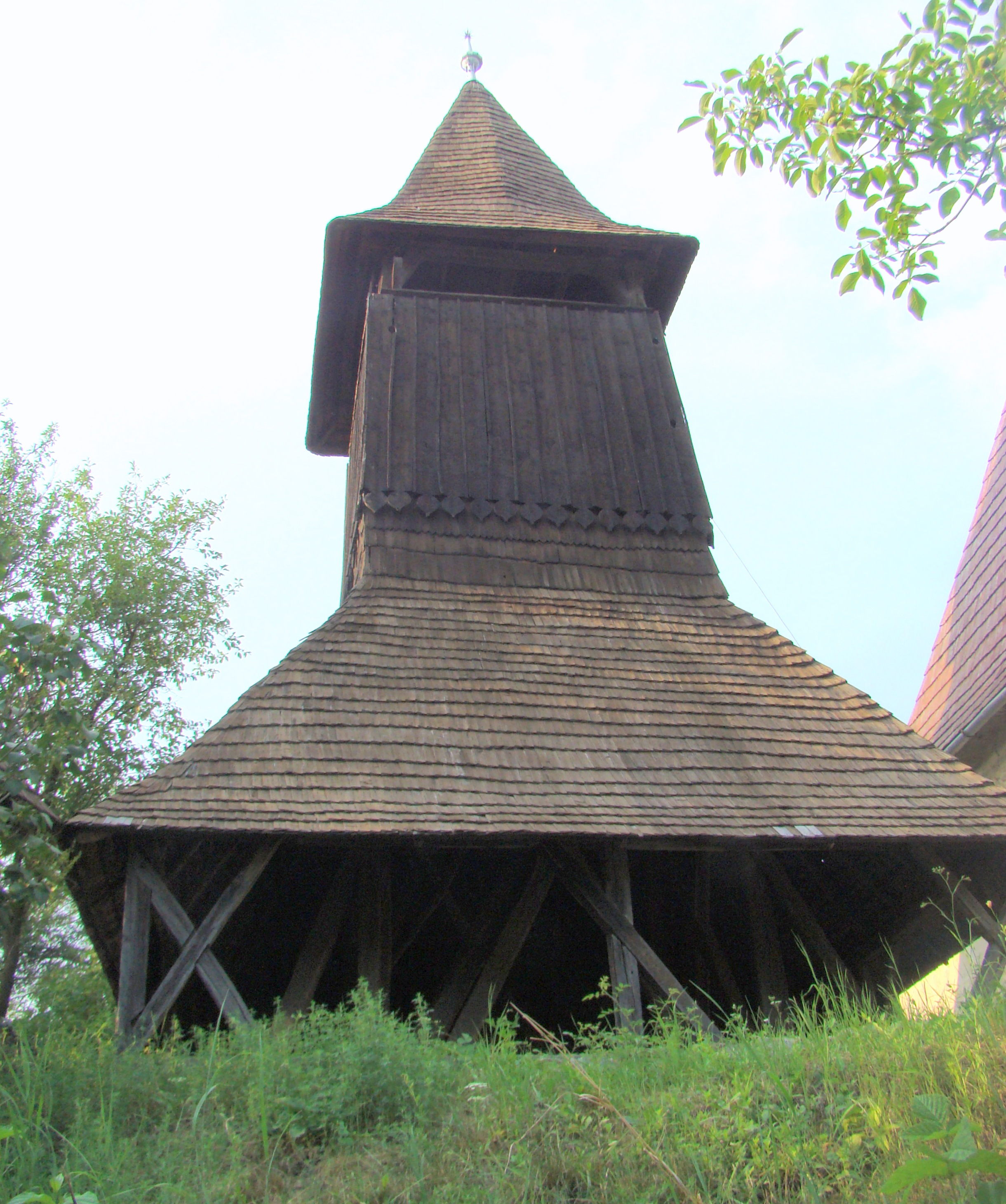 Clopotnița de lemn, sat Petrindu; comuna Cuzăplac 02